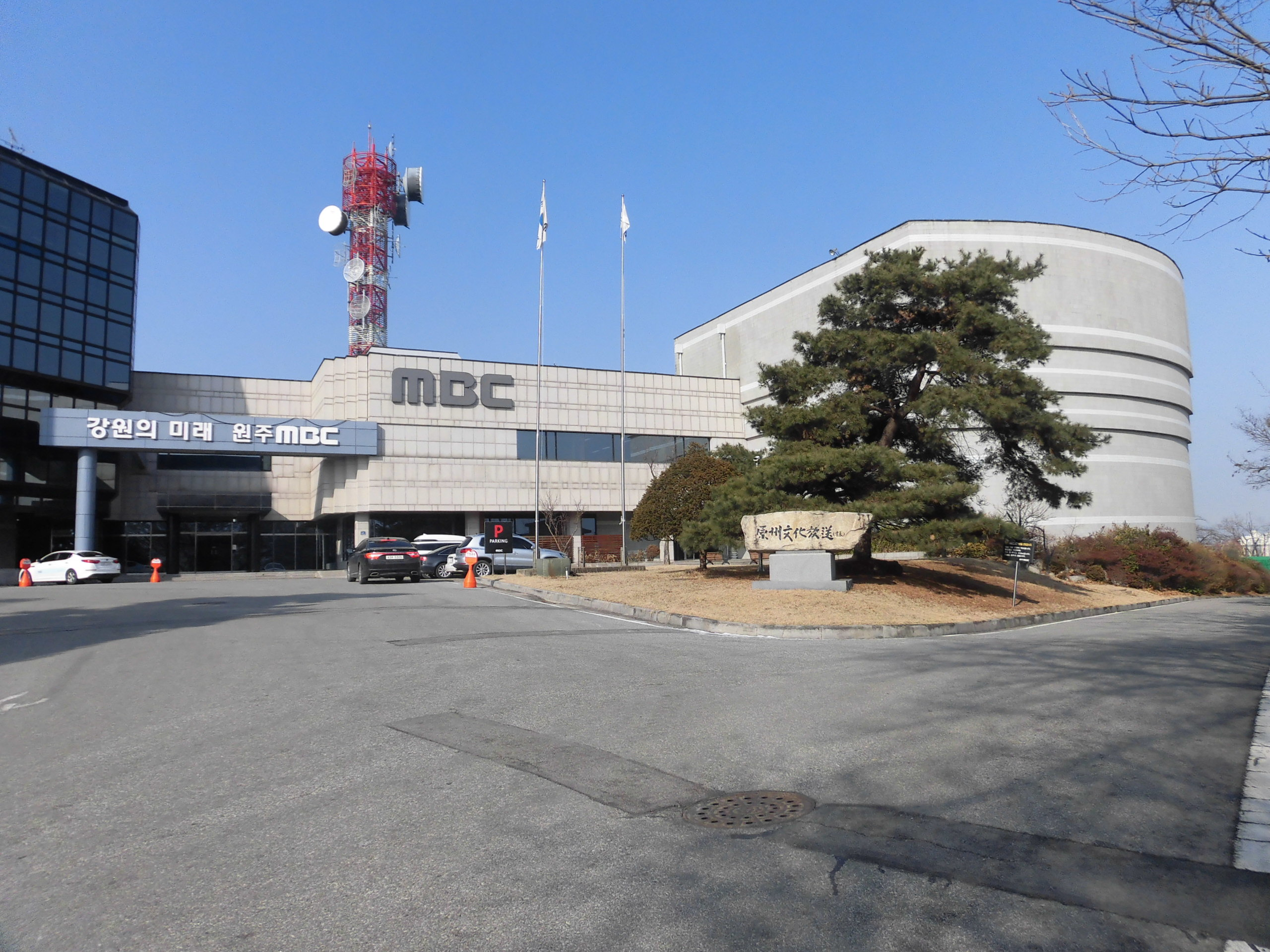 강원도 원주시에 있는 원주문화방송